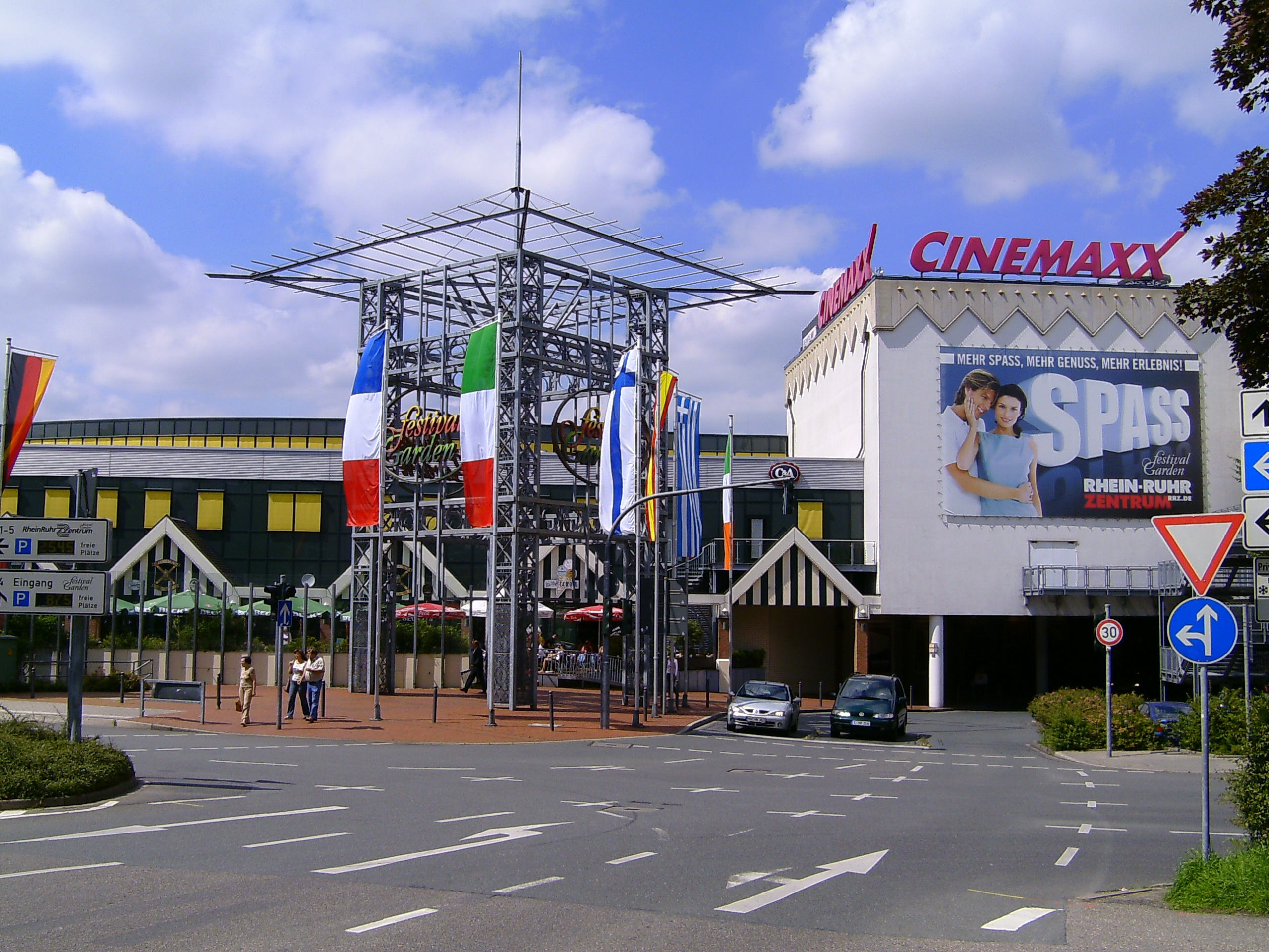 RheinRuhrZentrum, Mülheim